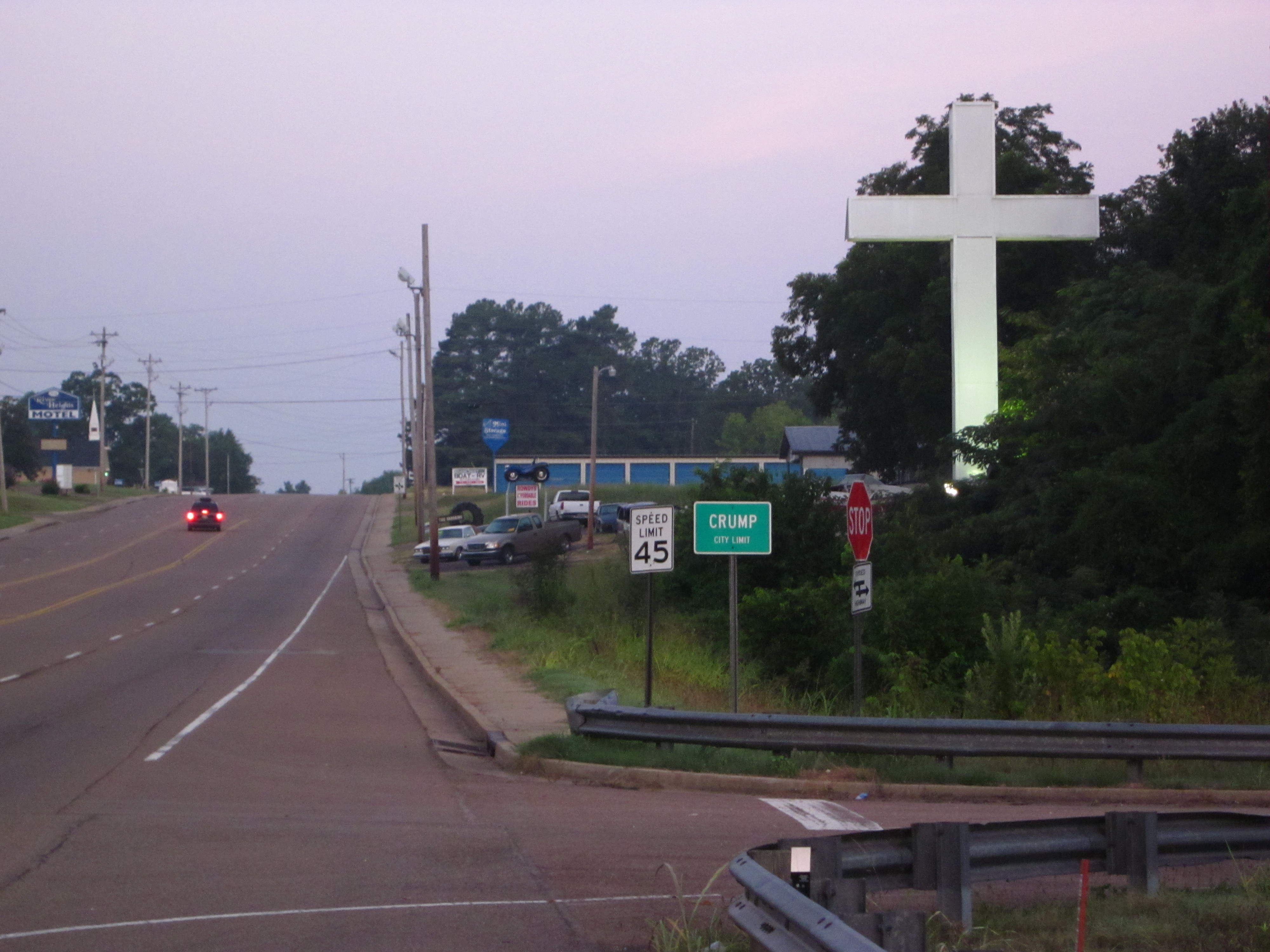 Crump, Tennessee